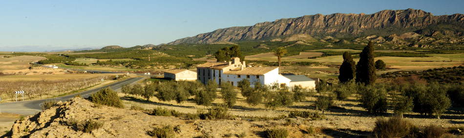 Gilico.